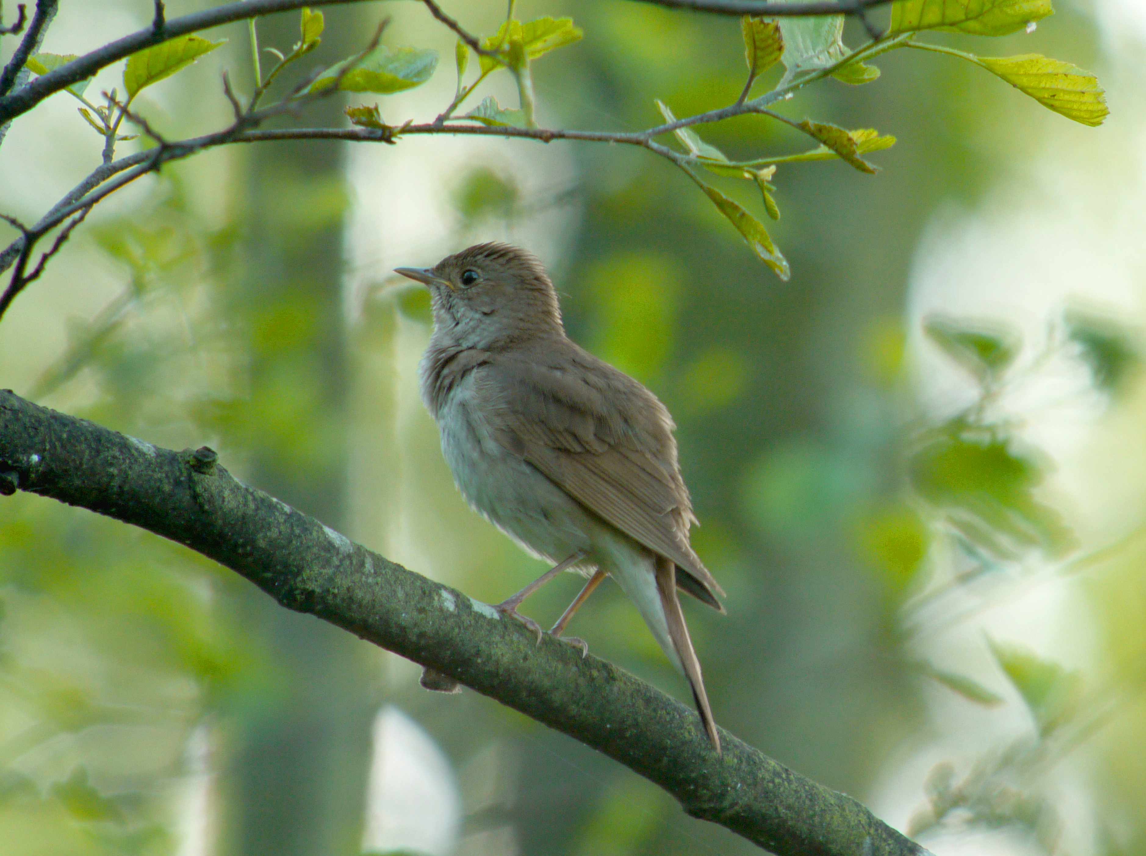 Luscinia luscinia, Gugny, Biebrzański Park Narodowy, Polska